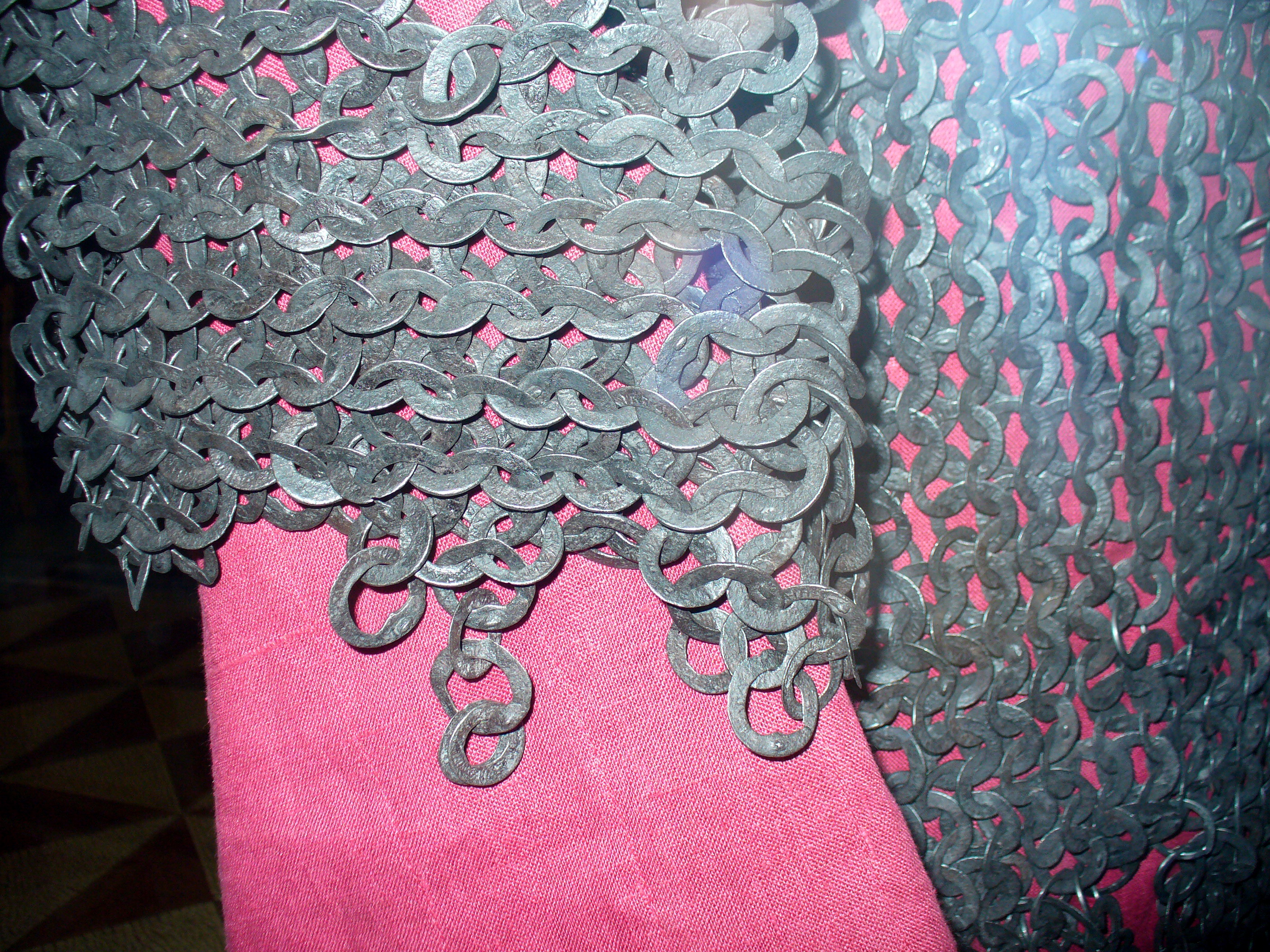 Байдана военного инженера, дьяка Разрядного приказа Выродкова. Надпись на кольцах: "Иван Григорьевич Выродков". Россия, XVI век, железо, ковка.